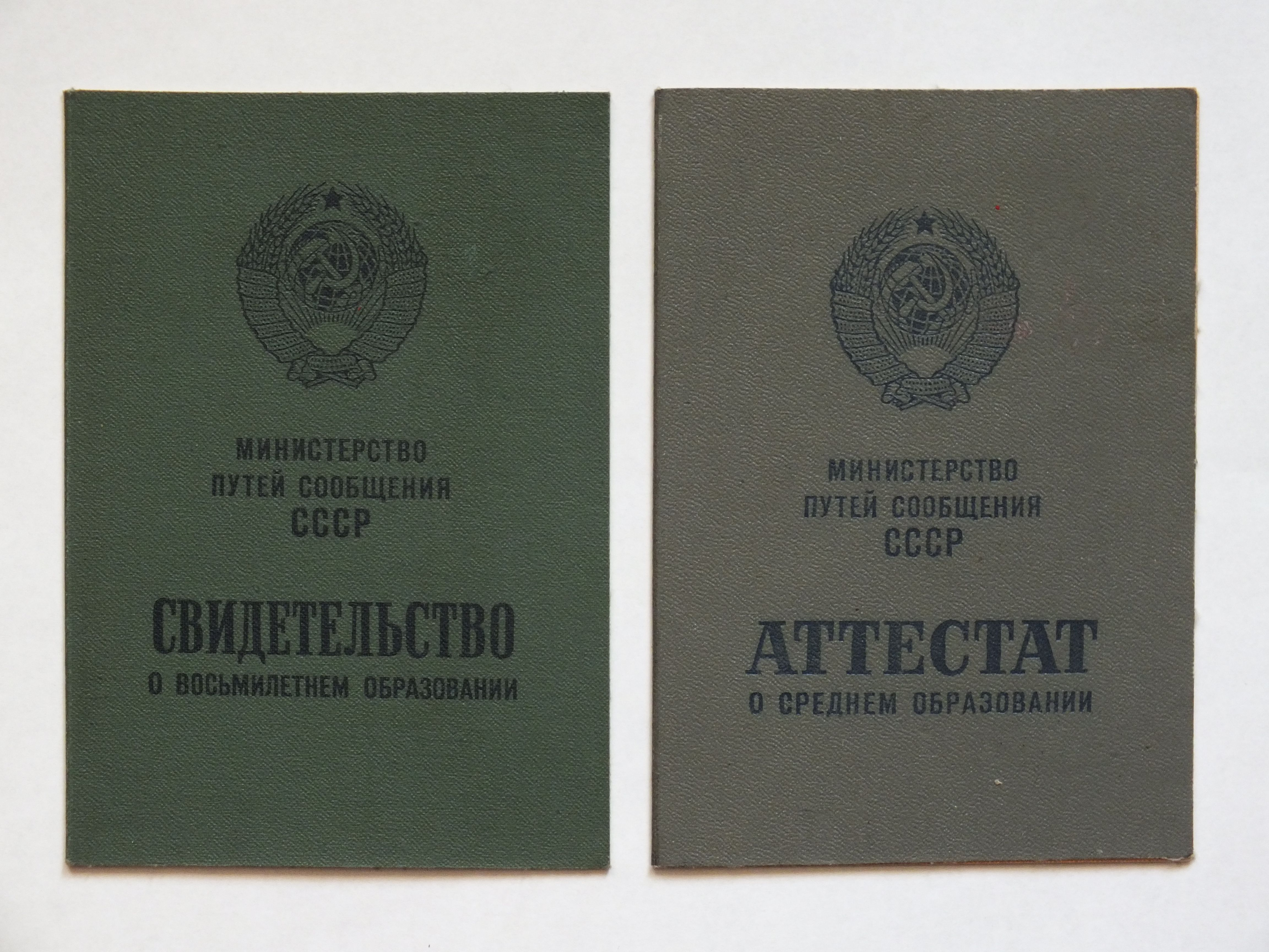 Свидетельство об окончании 8-летней школы и аттестат зрелости ведомственной школы МПС СССР 1970 годы